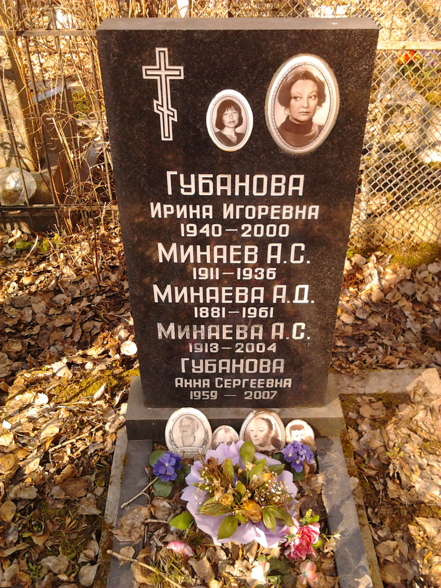 Надгробие И. И. Губановой на Серафимовском кладбище Санкт-Петербурга.